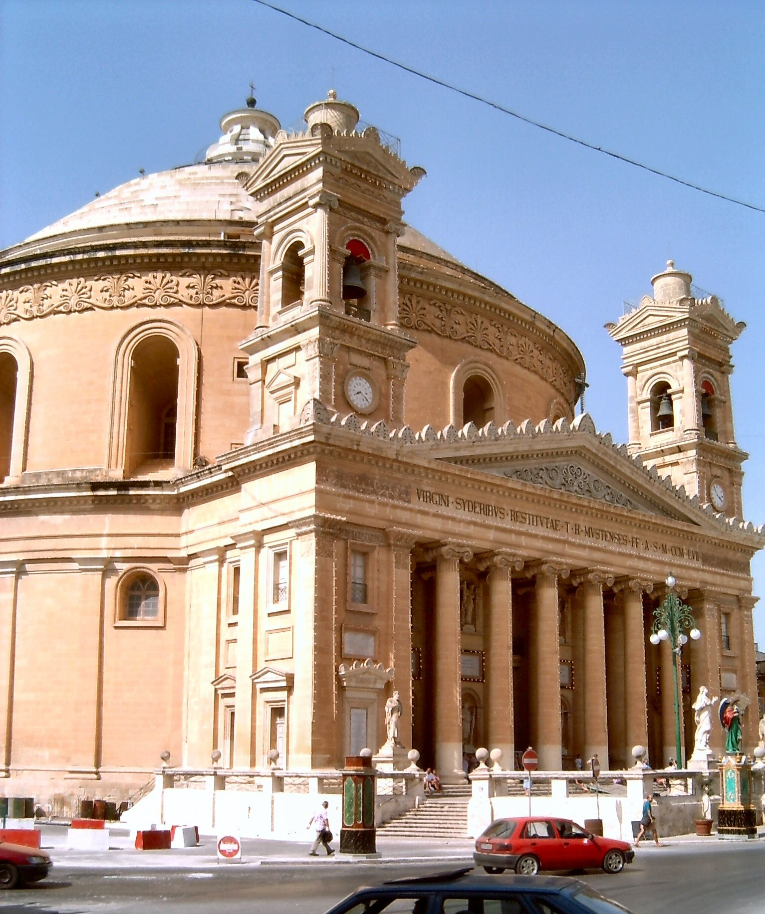 Rotunda Santa Marija Assunta, Mosta (Malta). Foto door Cicero, augustus 2005.